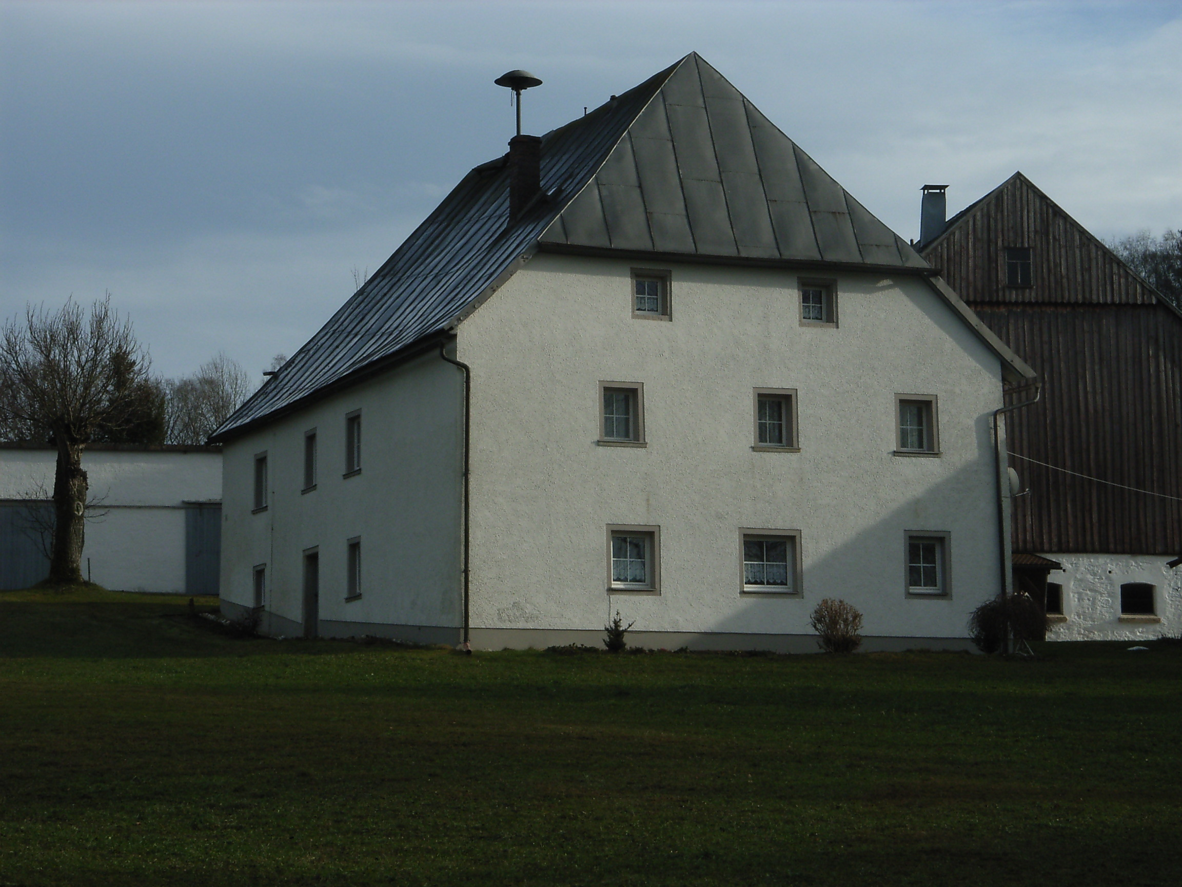 Schönau Hüttenhof (2013)